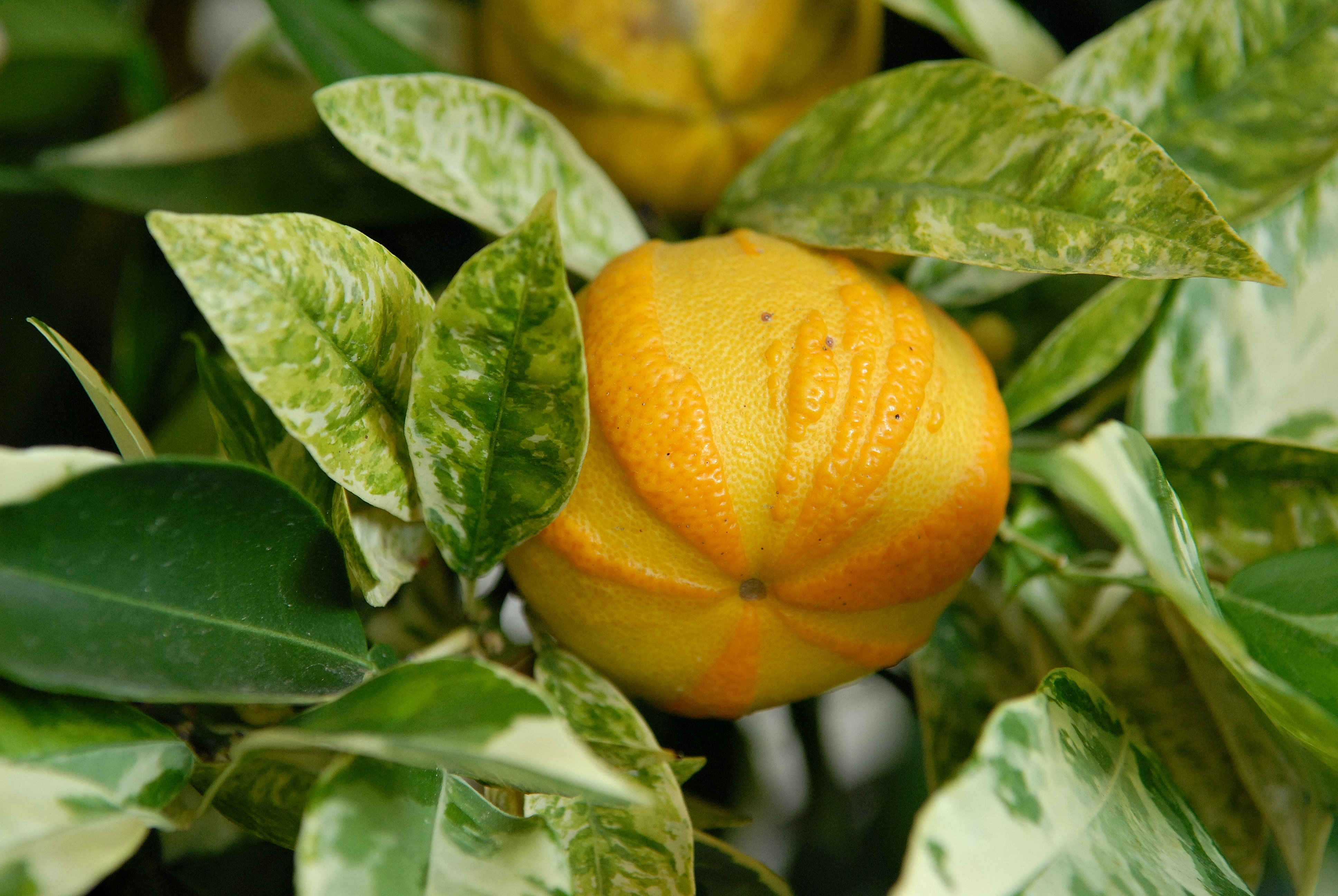 Deutsche Landsknechthose in der Ausstellung der 12. Wiener Zitrustage in der Orangerie Schönbrunn, 2012.